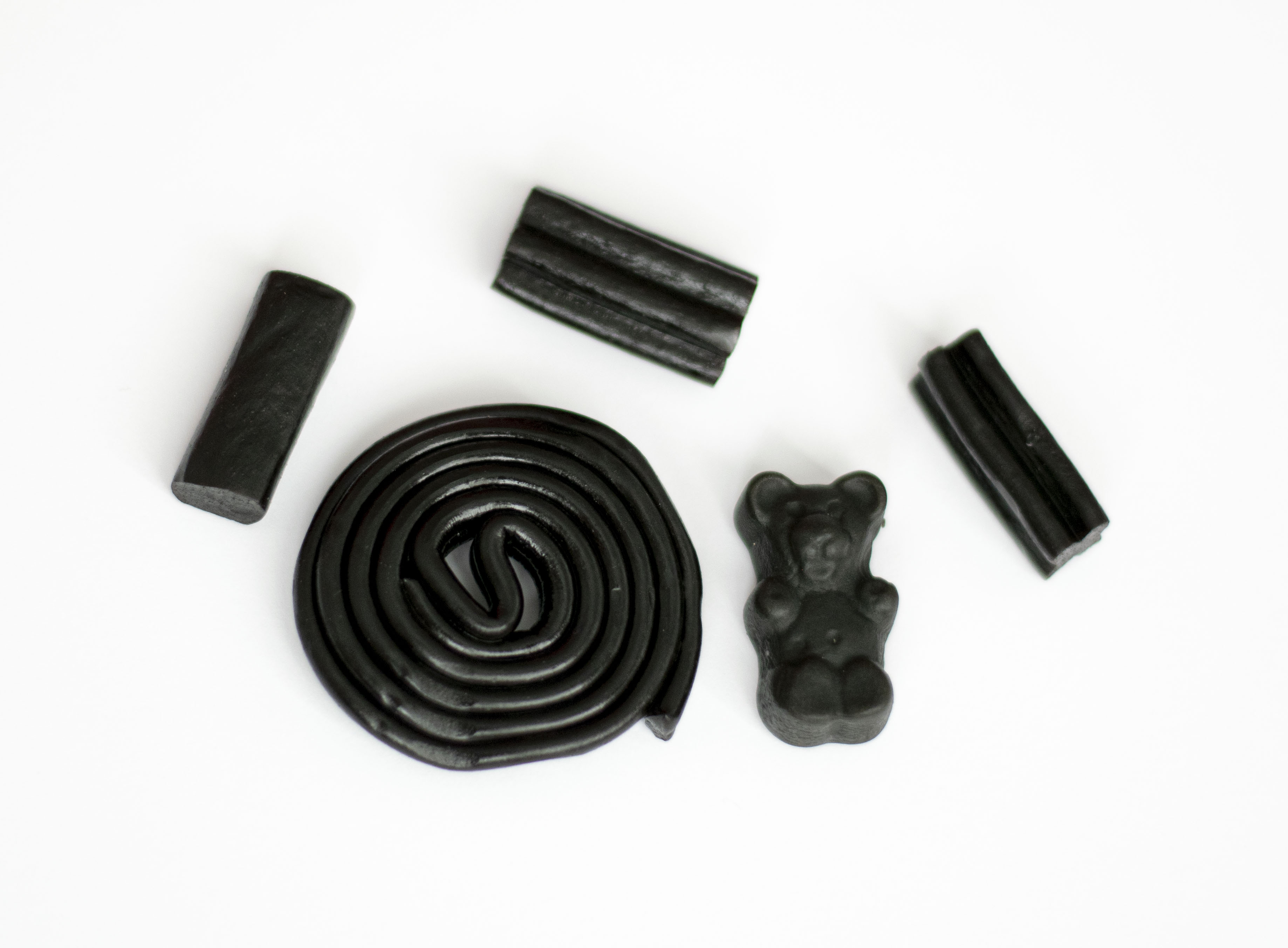 Lakritzvarianten Stange, Schnecke, Bär